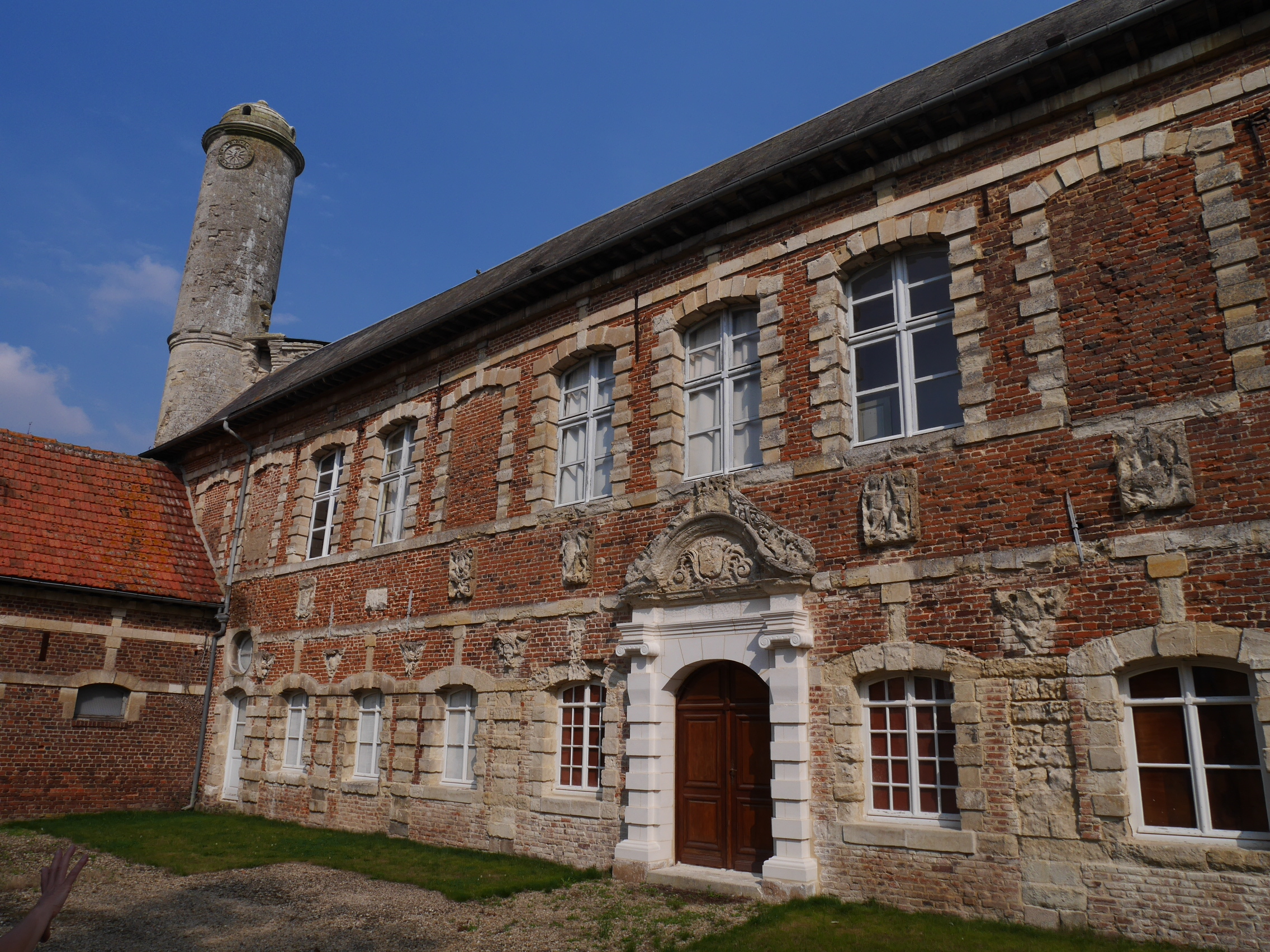 Château d'Esnes (vue prise de la cour intérieure)